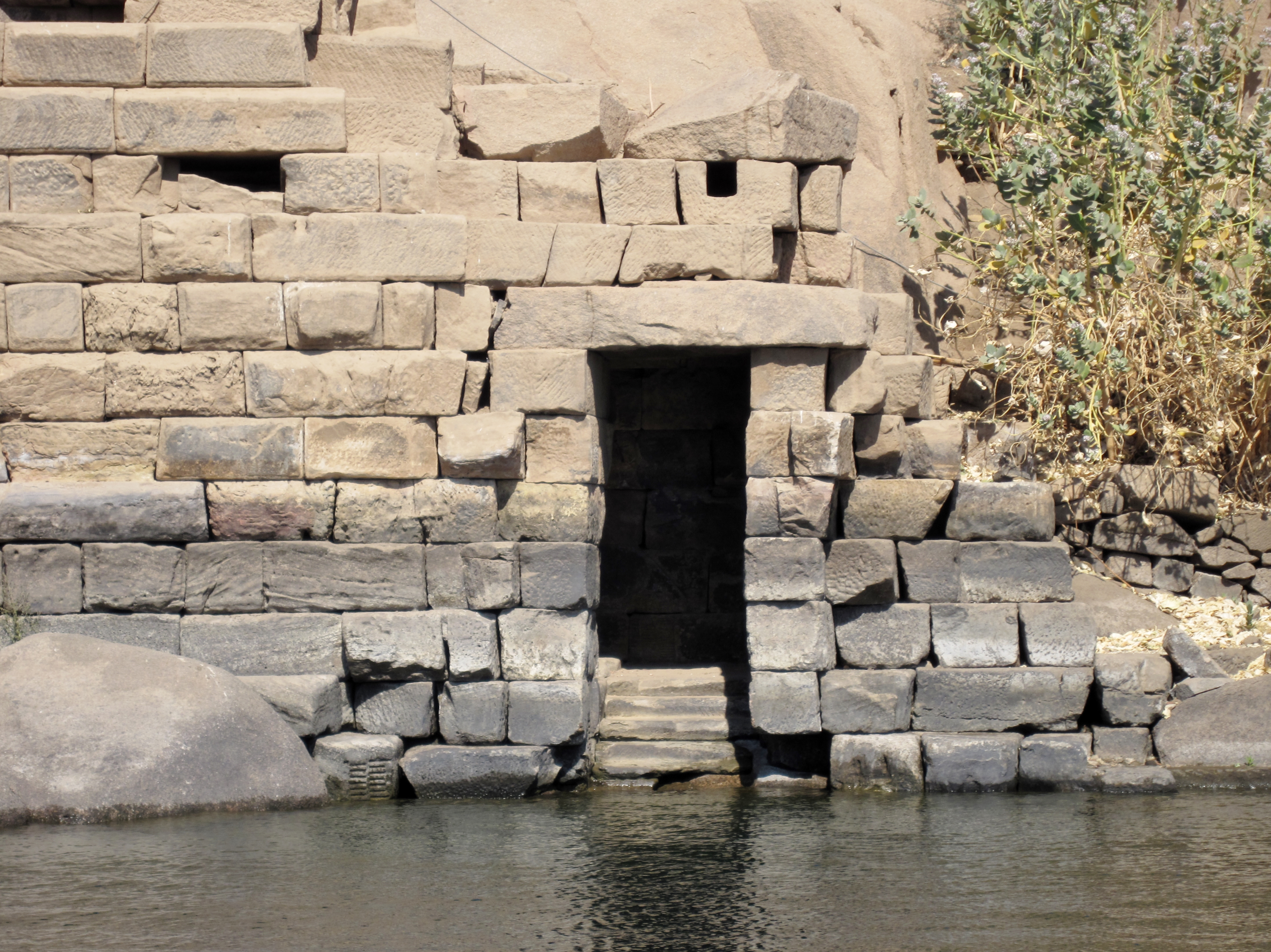 Nilometer an der Südostseite der Insel Elephantine in Assuan, Ägypten